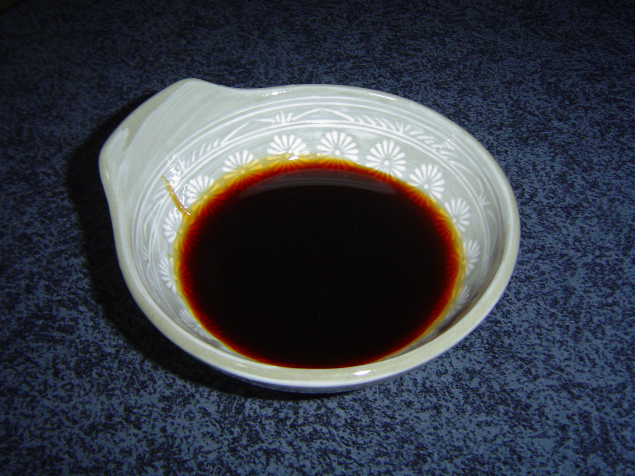 A bowl of rub (Libyan dates syrup). Shown here in a Japanese bowl.